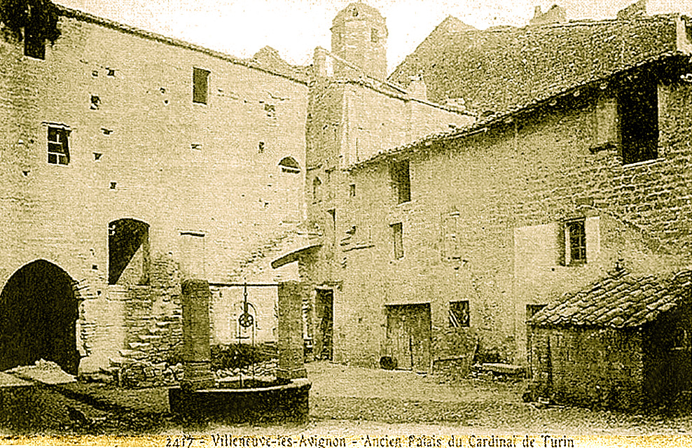 Palais du cardinal de Boulogne à Villeneuve-lès-Avignon, dit palais du cardinal de Turin